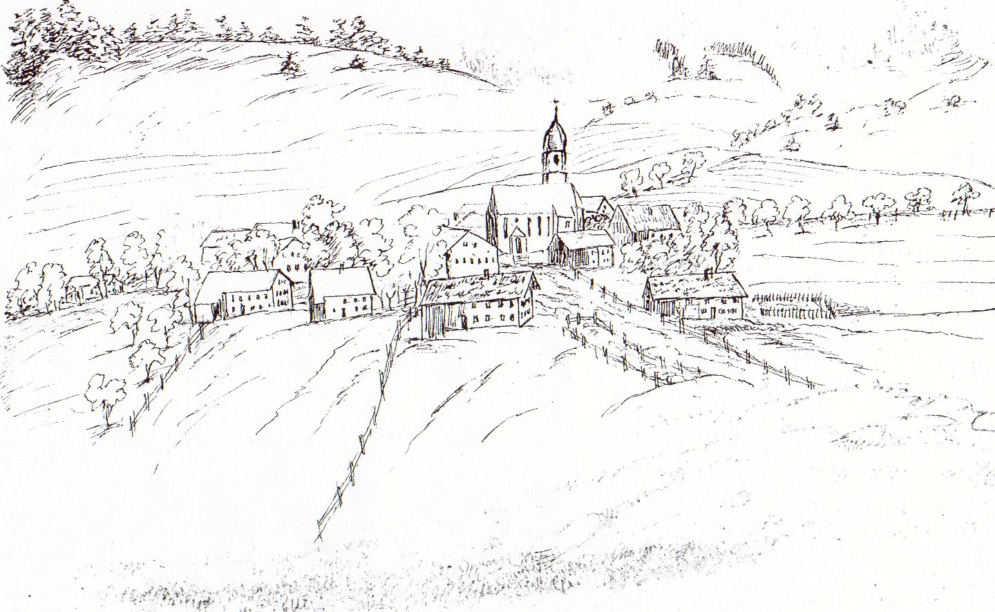 Tuschezeichnung mit der Ortsansicht von Zell (Ostallgäu), von Süden aus gesehen